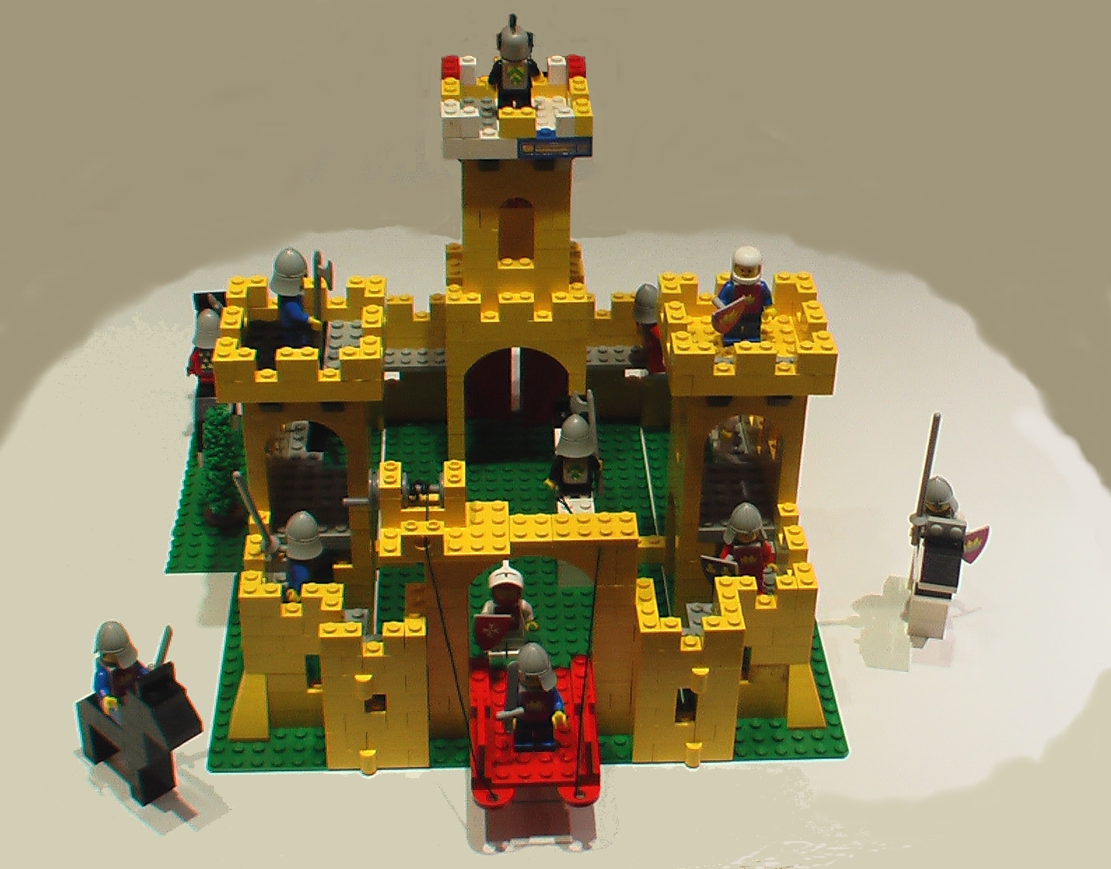 LEGO model "Legoland 375"